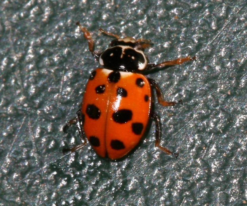 Lajares, Fuerteventura, Spain.